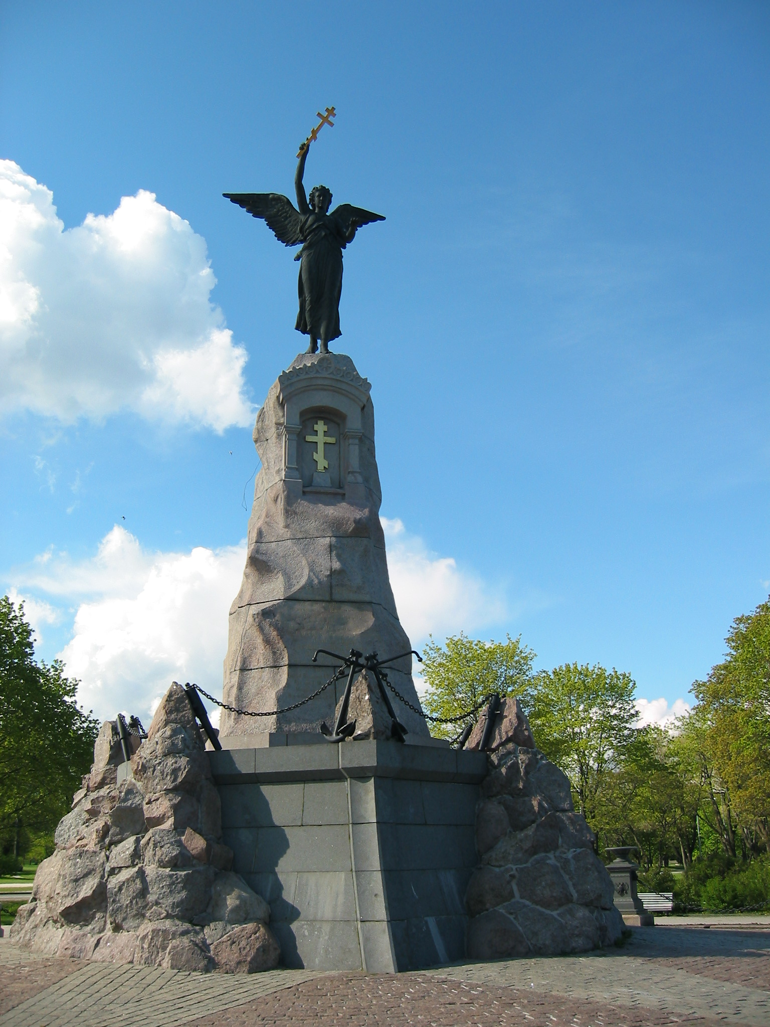 Rusalka Memorial